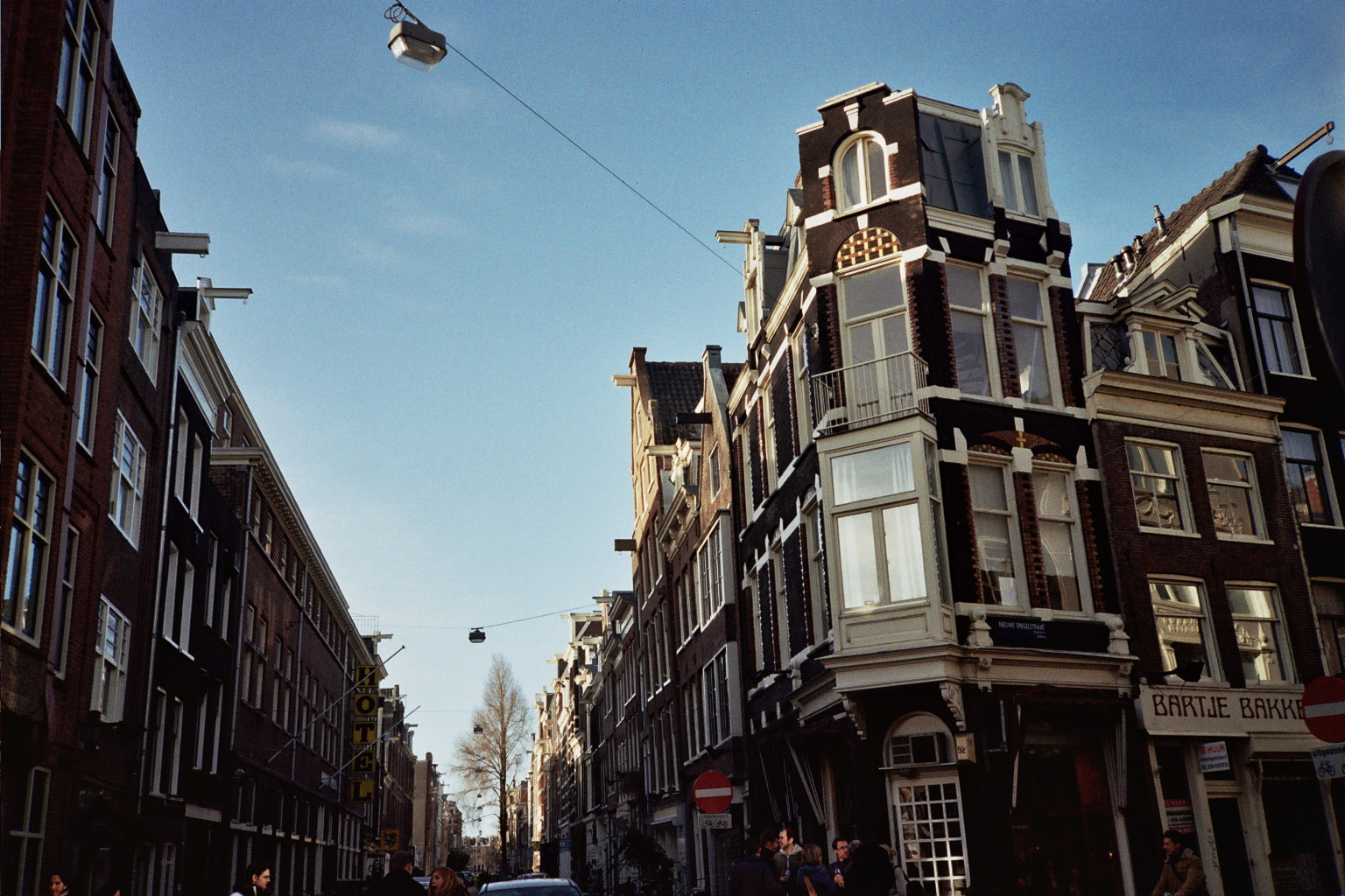 Kerkstraat in Amsterdam